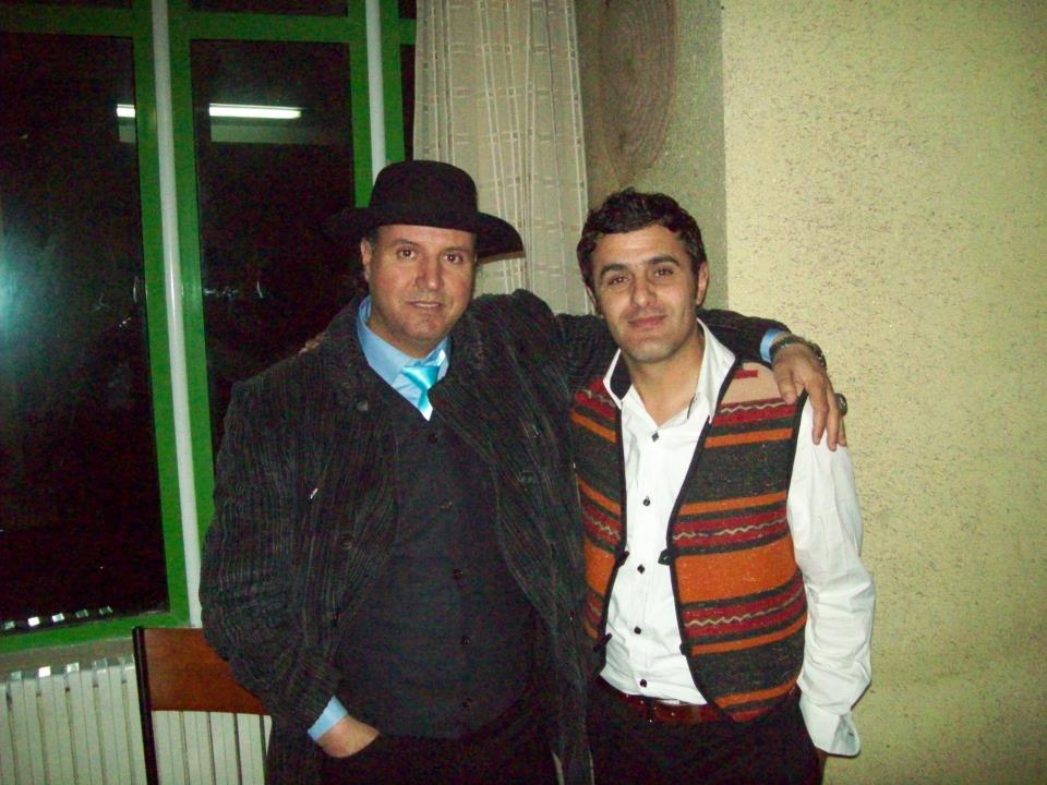 Chanteurs de musique chaoui, Massinissa et ishem du groupe Tafert. (Boumediene Tahar)